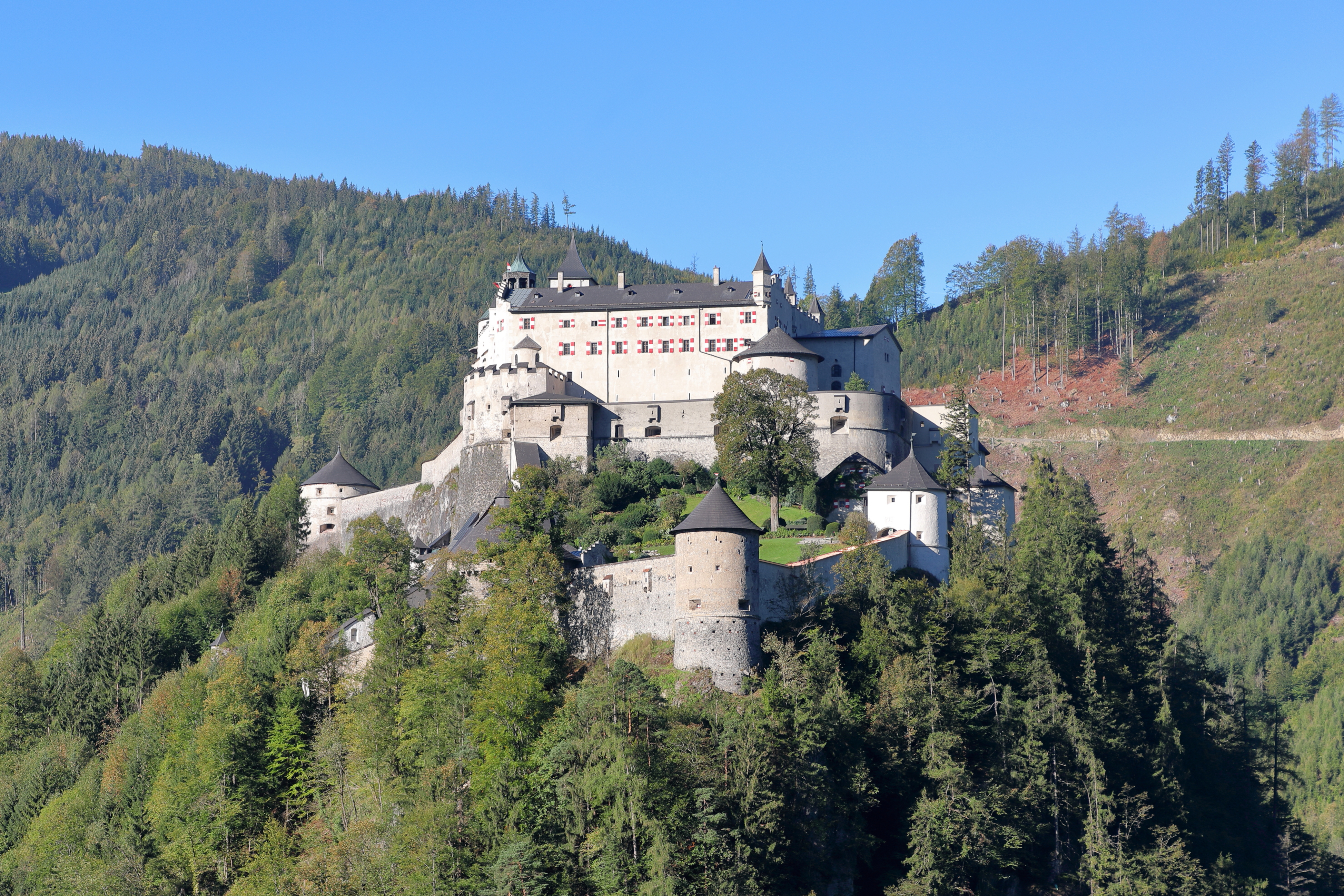 Ostnordostansicht der Burg Hohenwerfen, auch als Festung Hohenwerfen bezeichnet, in der Salzburger Marktgemeinde Werfen.Die ab dem 11. Jahrhundert errichtete Burg war ein strategisches Bollwerk zwischen dem Tennen- und Hagengebirge auf einem 155 Meter hohen markanten Felskegel im Salzachtal.